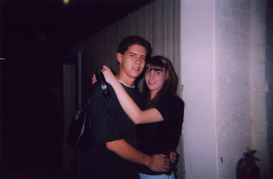 A woman and a man hugging.